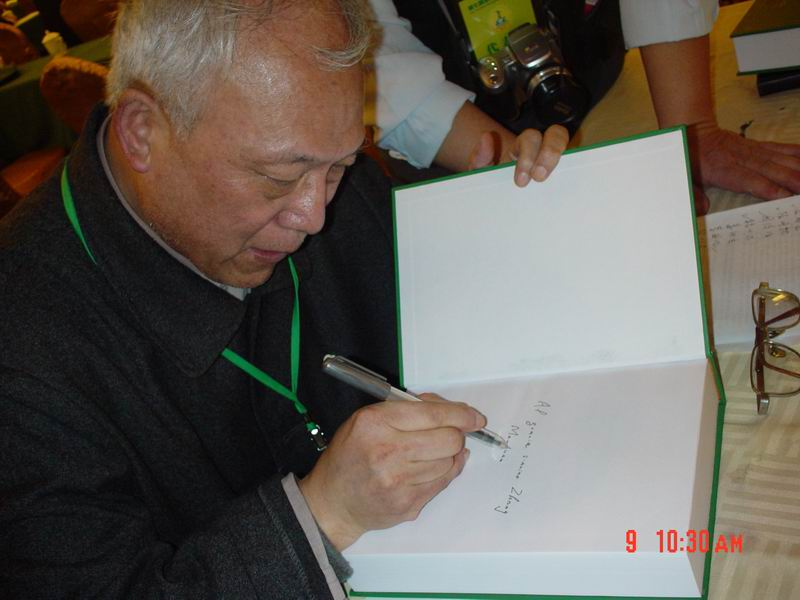 S-ro Wang Chongfang subskribas por aĉetantoj dum la 7-a Ĉina Kongreso de Esperanto. La kongreso okazis la 6-8an de decembro 2007 en Kantono.